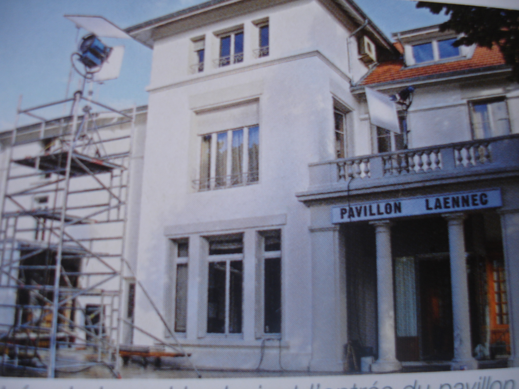 Feyzin (Rhône) : la mairie pendant le tournage d'un téléfilm